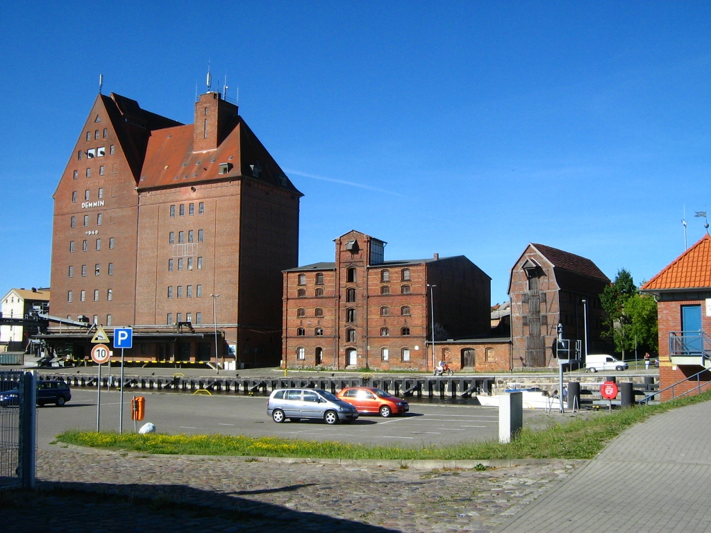 Speichergebäude am Hafen in Demmin (Vorpommern).